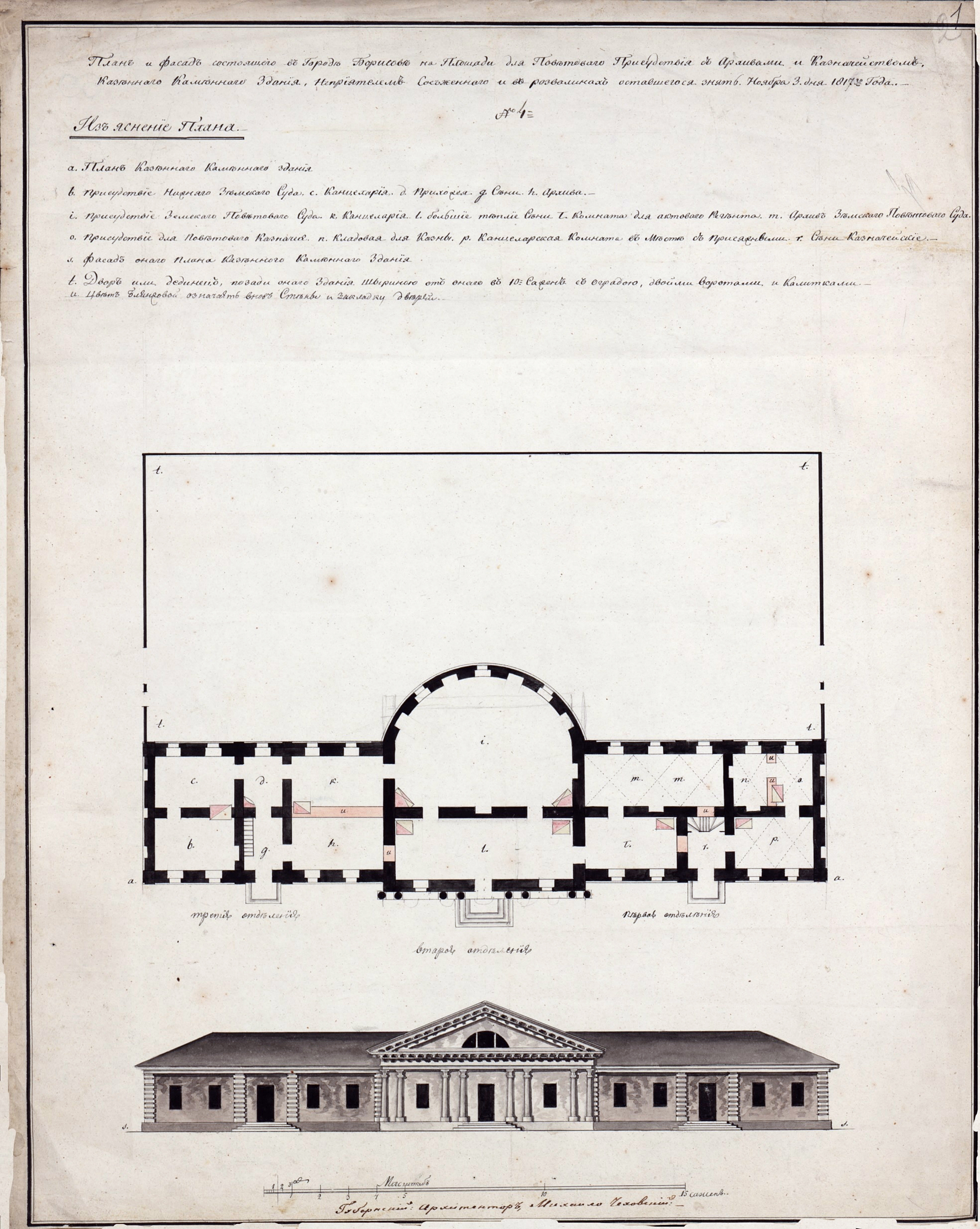 Беларуская (тарашкевіца): Барысаў (Barysaŭ), пляц Рынак (plac Rynak). Прысутныя месцы